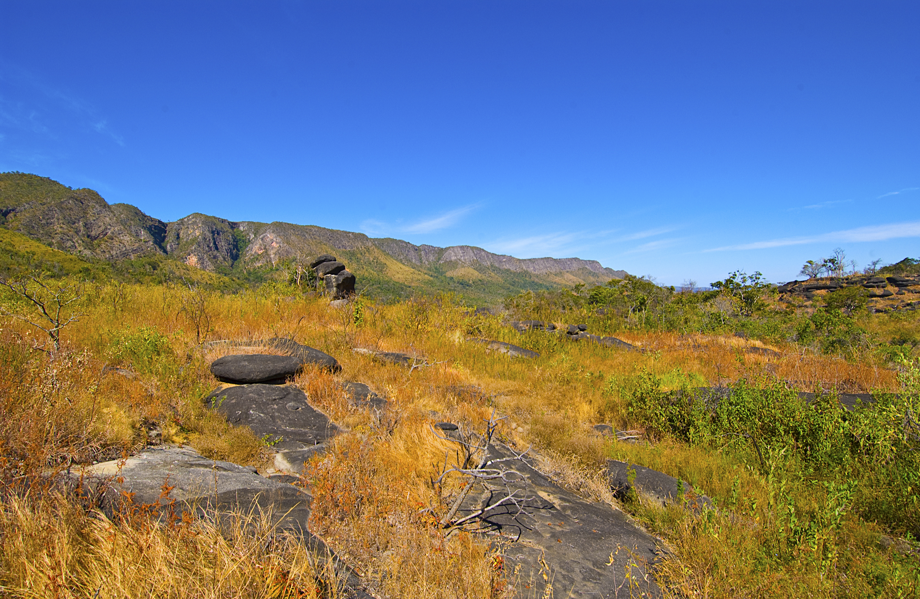 Parque Nacional da Chapada dos Vendeiros.